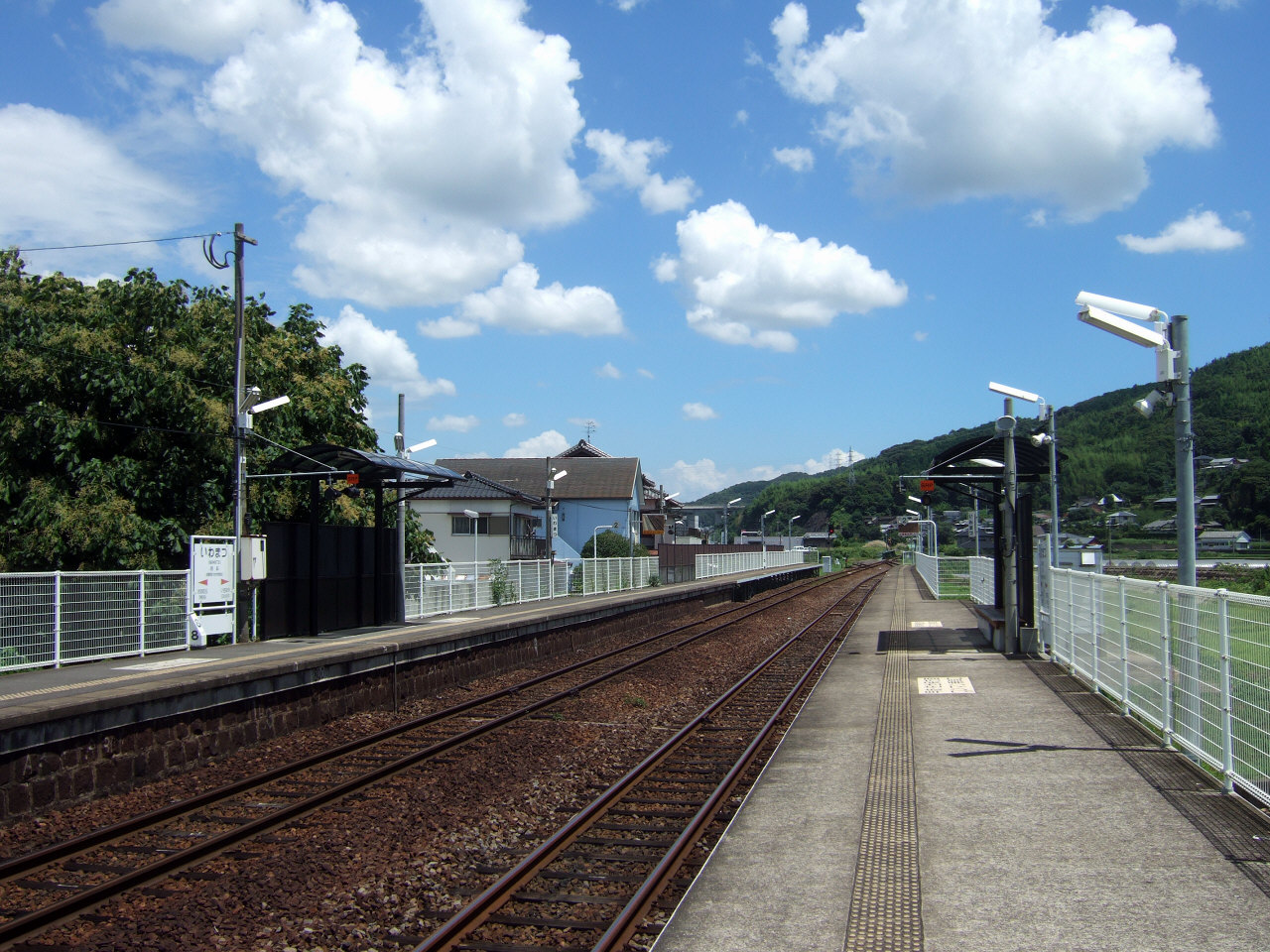 JR九州大村線岩松駅構内